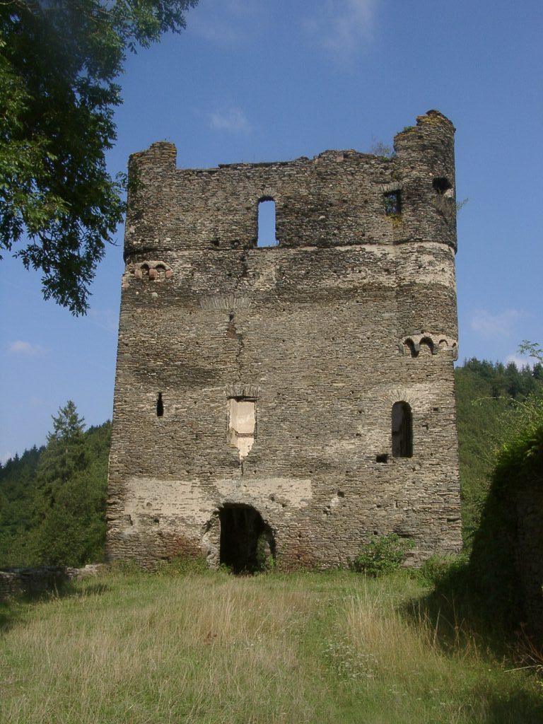 Balduinseck Westseite / western front